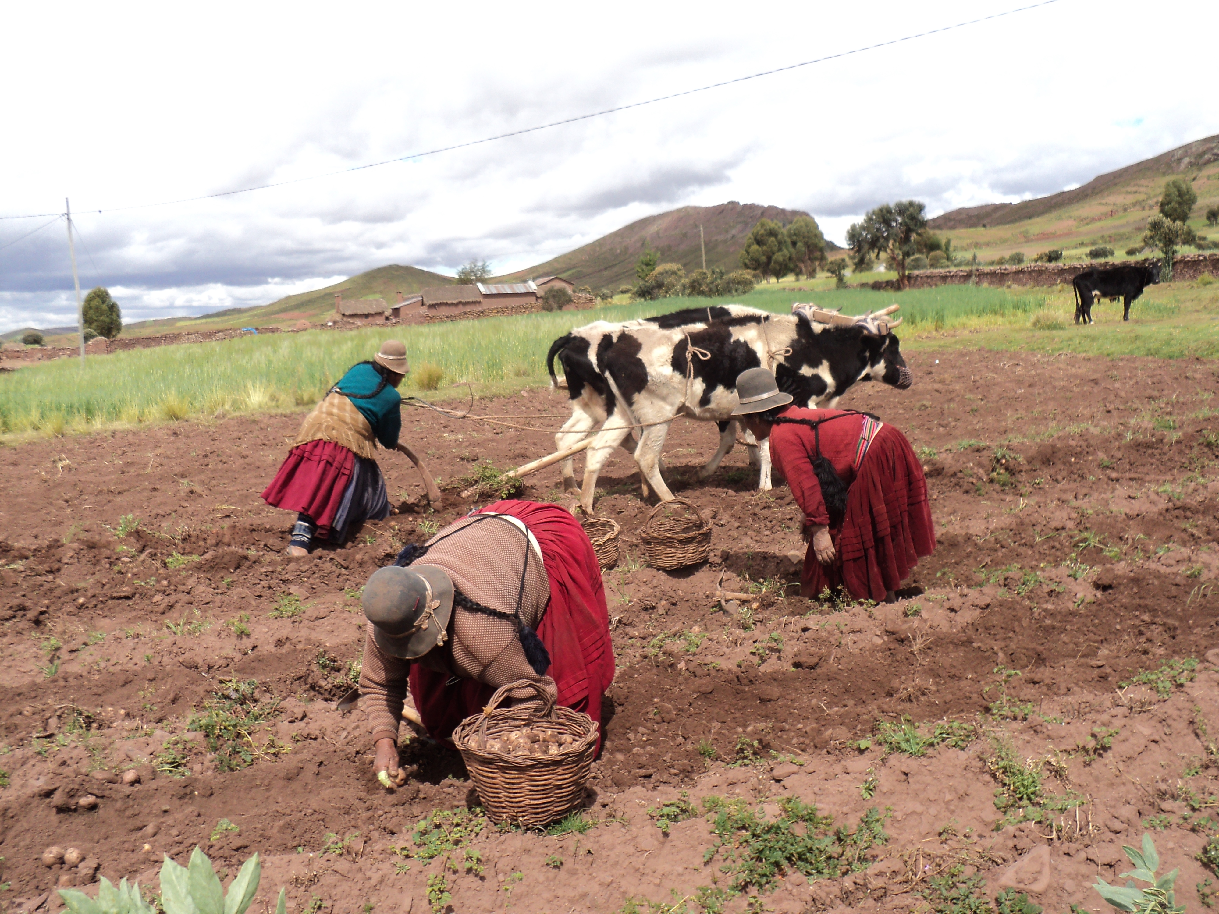 Aymar aru: Paninix ch'uqi llamayusipki, maynisti jasak ch'uqi pallsuñtakiw yuntamp ch'uqi suka jiskharaski.